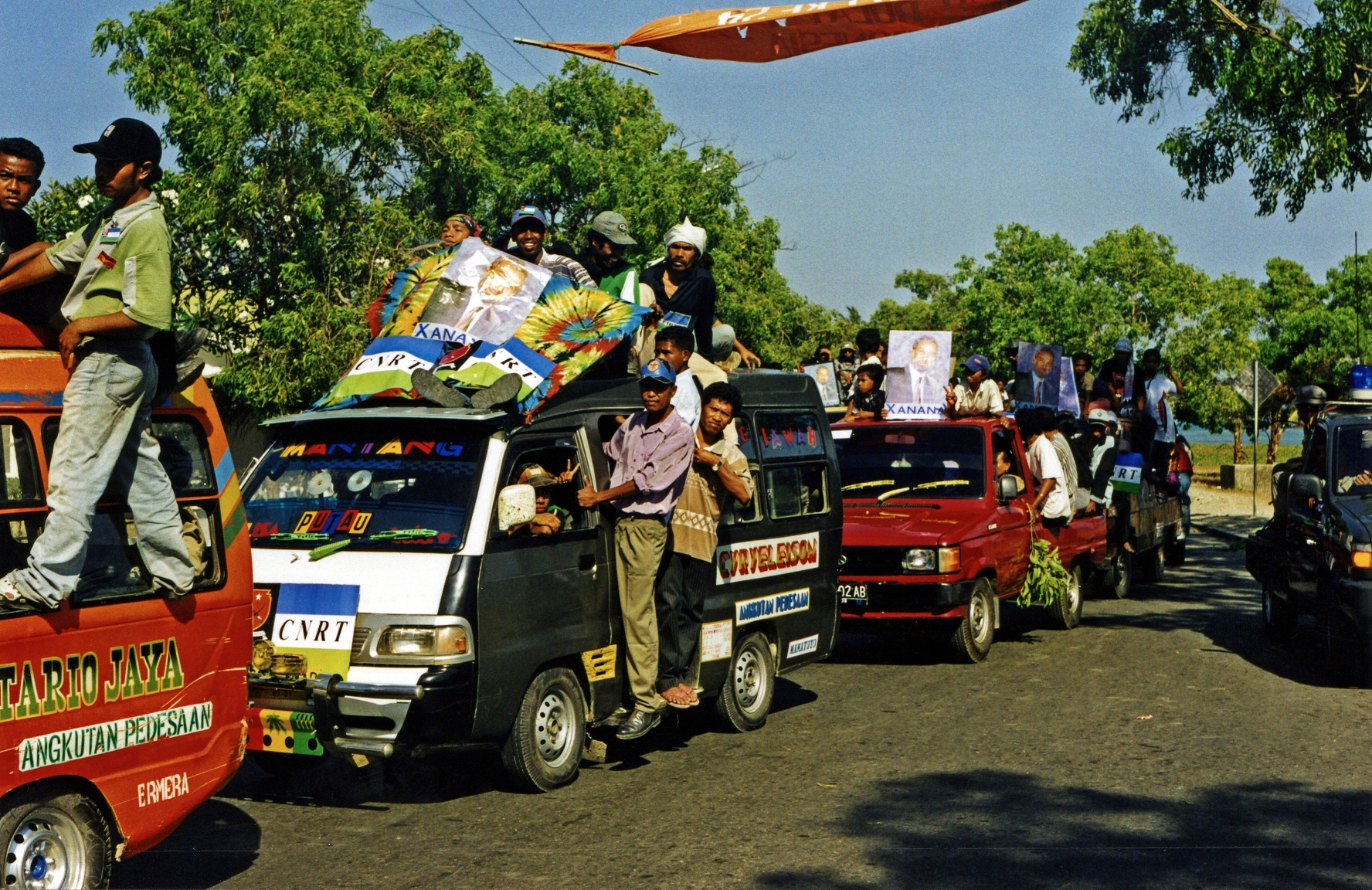 CNRT-Veranstaltung zum Unabhängigkeitsreferendum in Osttimor 1999 in Dili